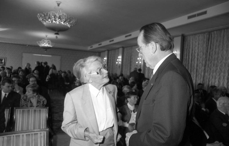 12.4.1991 Tagung der Ludwig-Erhard-Stiftung im Hotel Königshof - Verabschiedung des alten Vorsitzenden der Ludwig-Erhard-Stiftung MD a.D. Dr. Karl Hohmann, Begrüßung des neuen Vorsitzenden Staatssekretär Dr. Otto Schlecht (Amtswechsel am 1.3.1991)